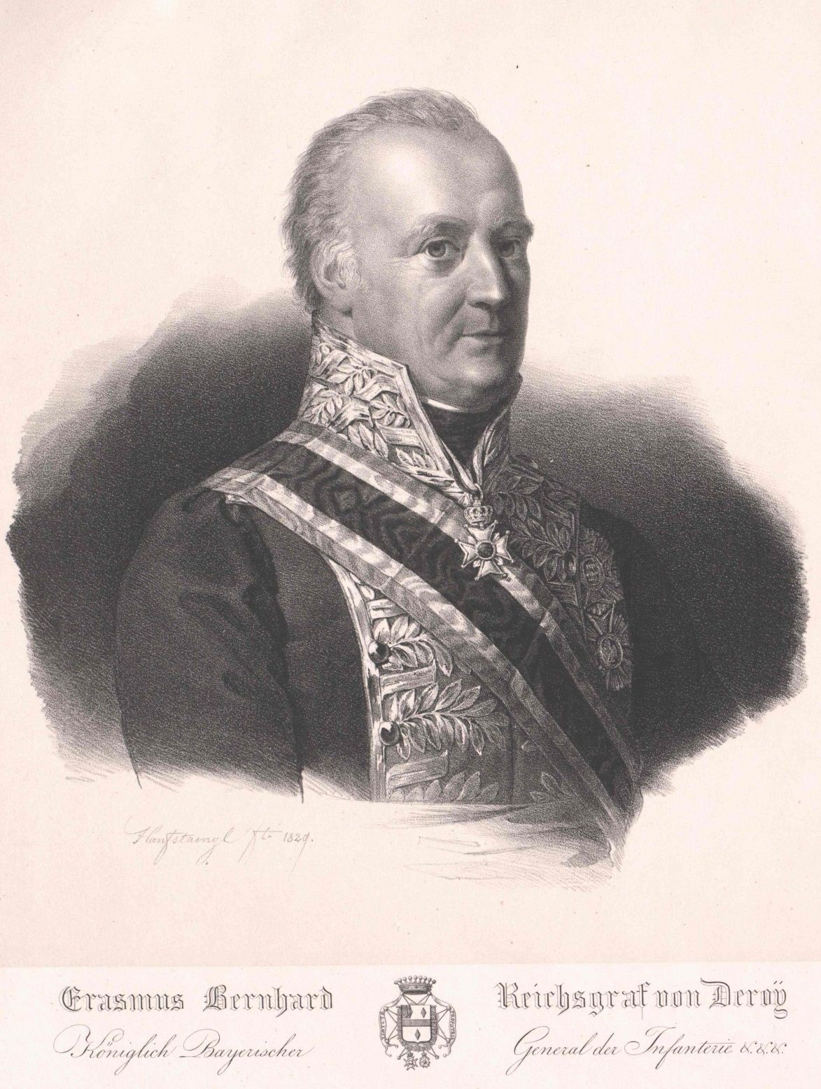 Le général Bernhard Erasmus von Deroy (F. Hanfstaengl, 1829).